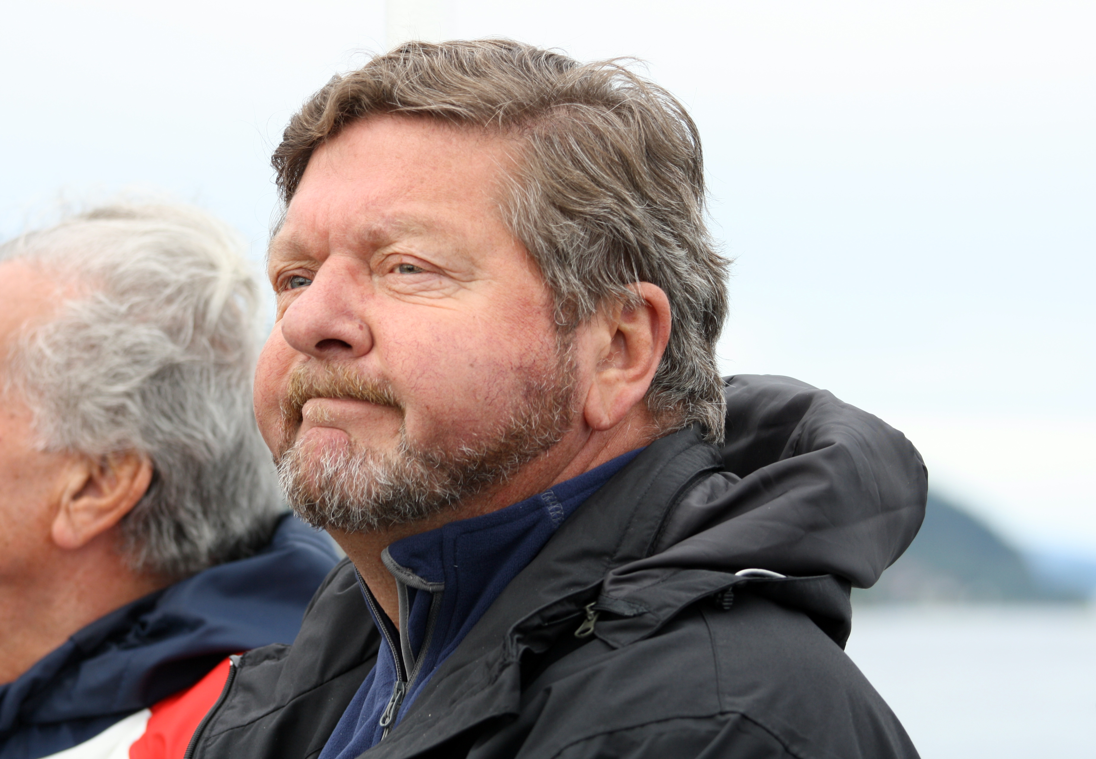 Trondheims rådmann Stein A. Ytterdahl.